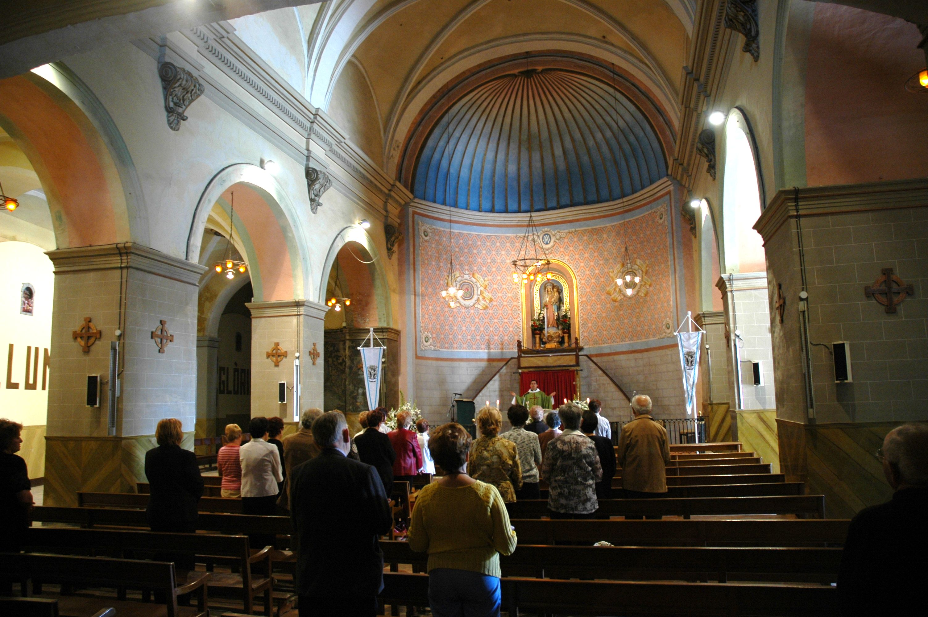 Església del Roser de Súria